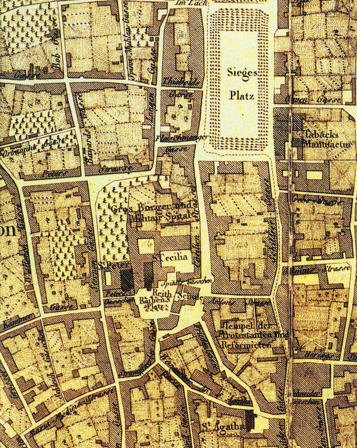 Köln um 1815 mit Neumarkt (Siegesplatz) und Umfeld, sowie dem Gelände des Bürgerhospitals